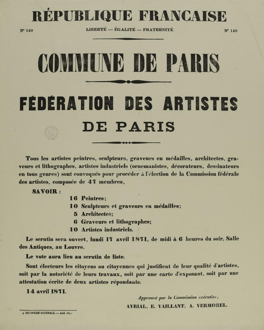 Affiche de la Commune de Paris concernant l'élection de la commission fédérale de la Fédération des artistes de Paris.